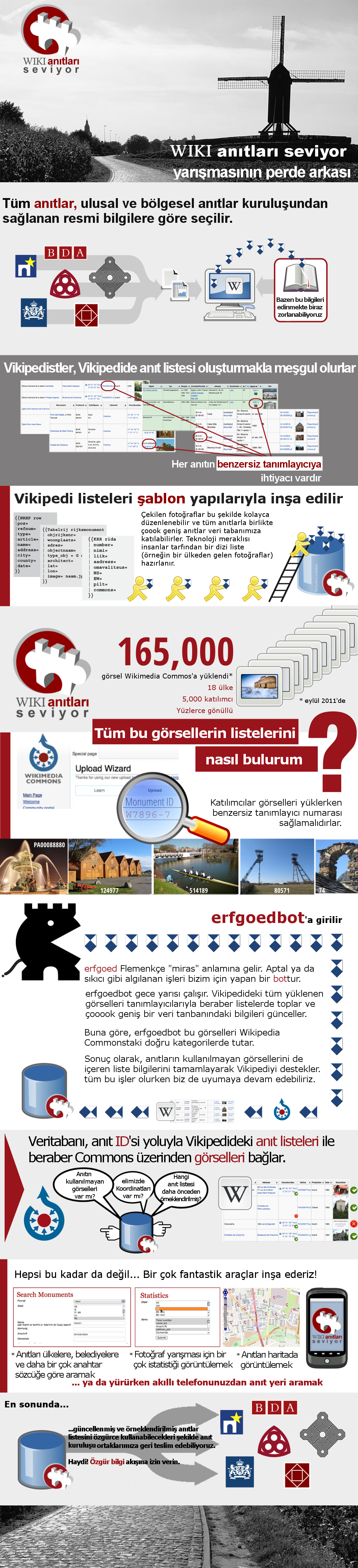 WLM Türkçe infografik.